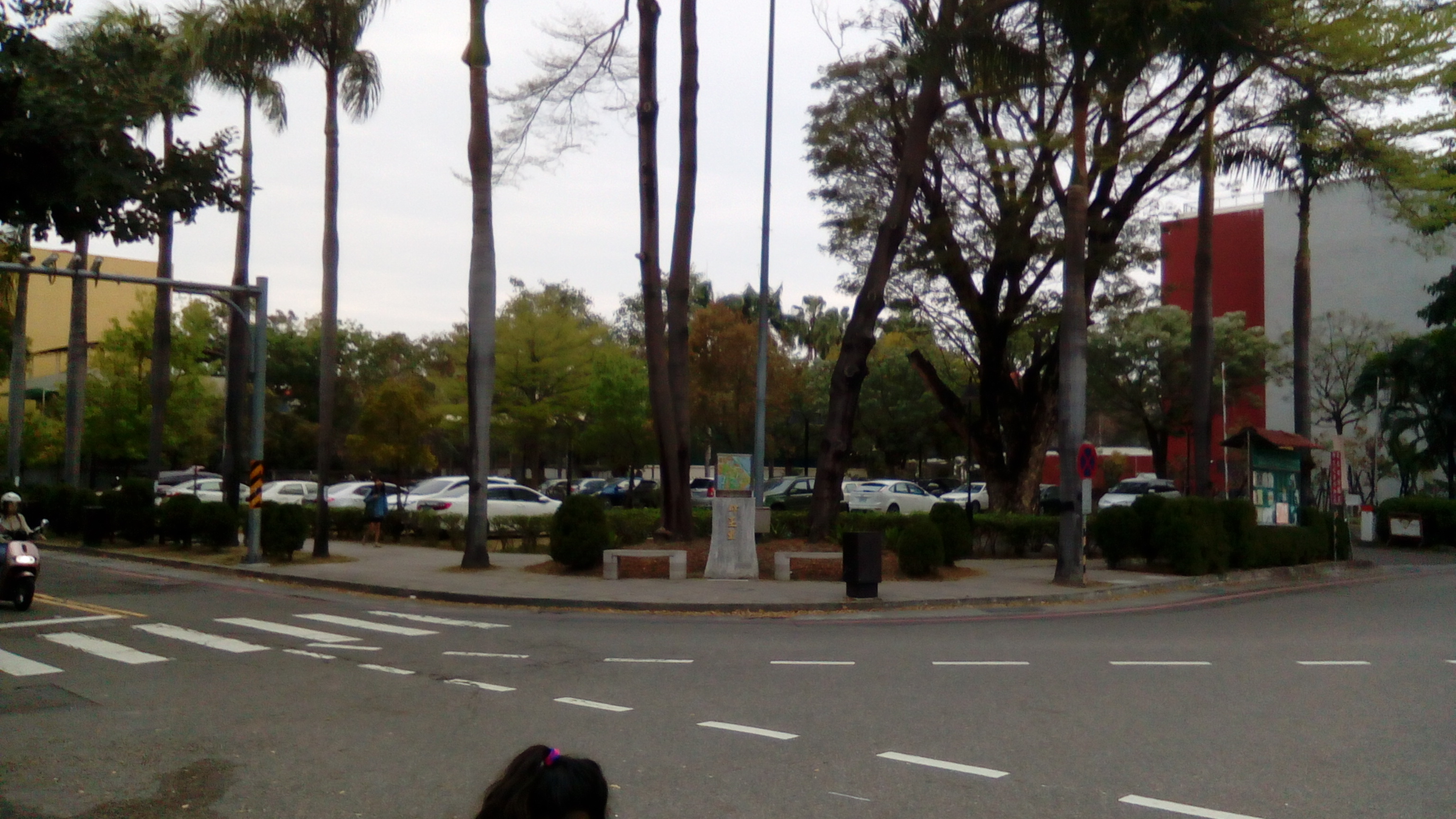 樹林街二段旁 近側門及台南大學